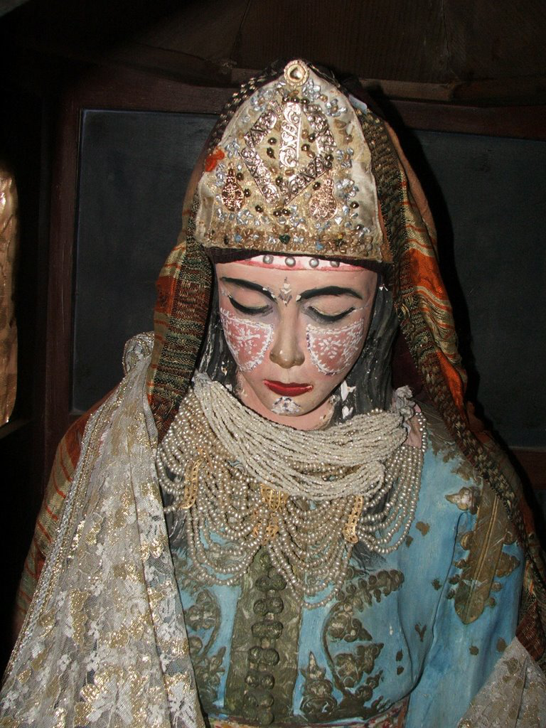 Interior del Museo de Etnografía de Tetuán